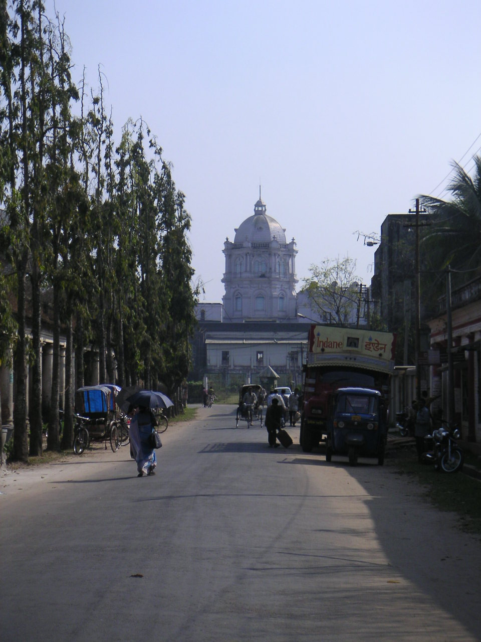 Ujjayanta Palace, Agartala, Tripura. Photo: Soman